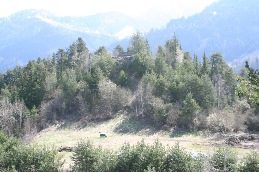 Schiedberg Hügel